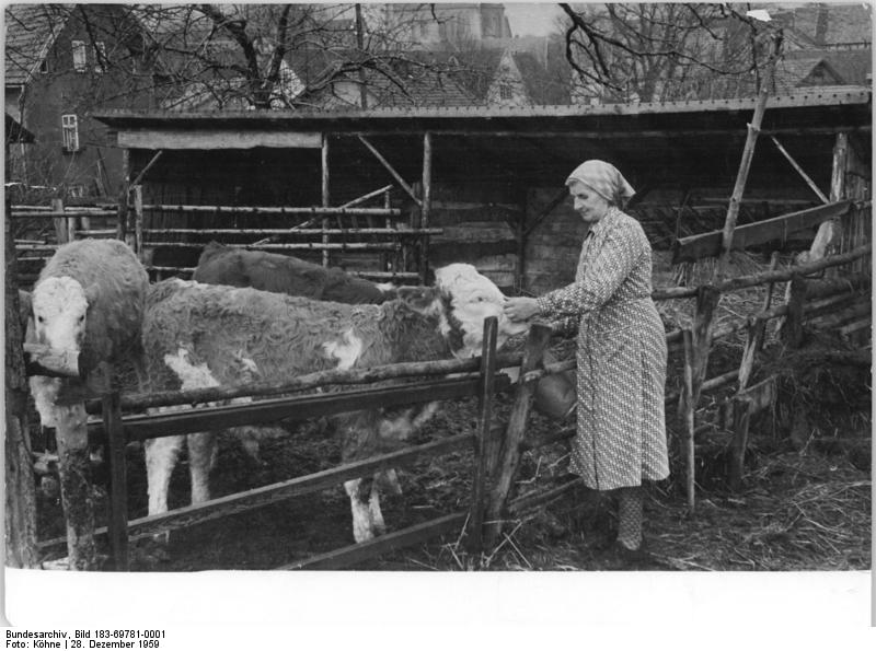 Dreissigacker, Bäuerin beim Füttern Zentralbild Köhne 28.12.1959 LPG Dreissigacker machte mit Kälberhütten gute Erfahrungen Die LPG "Friedlicher Aufbau" in Dreissigacker, Kreis Meiningen, arbeitet nach Typ III und verfügt bei einer LNF von 157 ha über 122 Stück Rindvieh. Trotz der in den vergangenen Jahren errichteten Stallbauten konnte der akute Platzmangel nur durch die Errichtung von Kälberhütten behoben werden. "Wir haben diese Kälberhütten bereits vor drei Jahren errichtet, " erklärte Agronom Roth. "Wir werden sie auch künftig beibehalten, weil wir festgestellt haben, dass die Kälberhütten eine gute Vorstufe für die spätere Haltung der Tiere in unserem Offenstall darstellen". Die drei Kälberhütten, die von der Handwerkerbrigade der LPG errichtet wurden, sind durchschnittlich mit 18 Tieren belegt, die dort bis zum Alter von einem halben Jahr bleiben. UBz: Jungviehpflegerin Frieda Haschke beim Füttern. Im Hintergrund Kälberhütten.